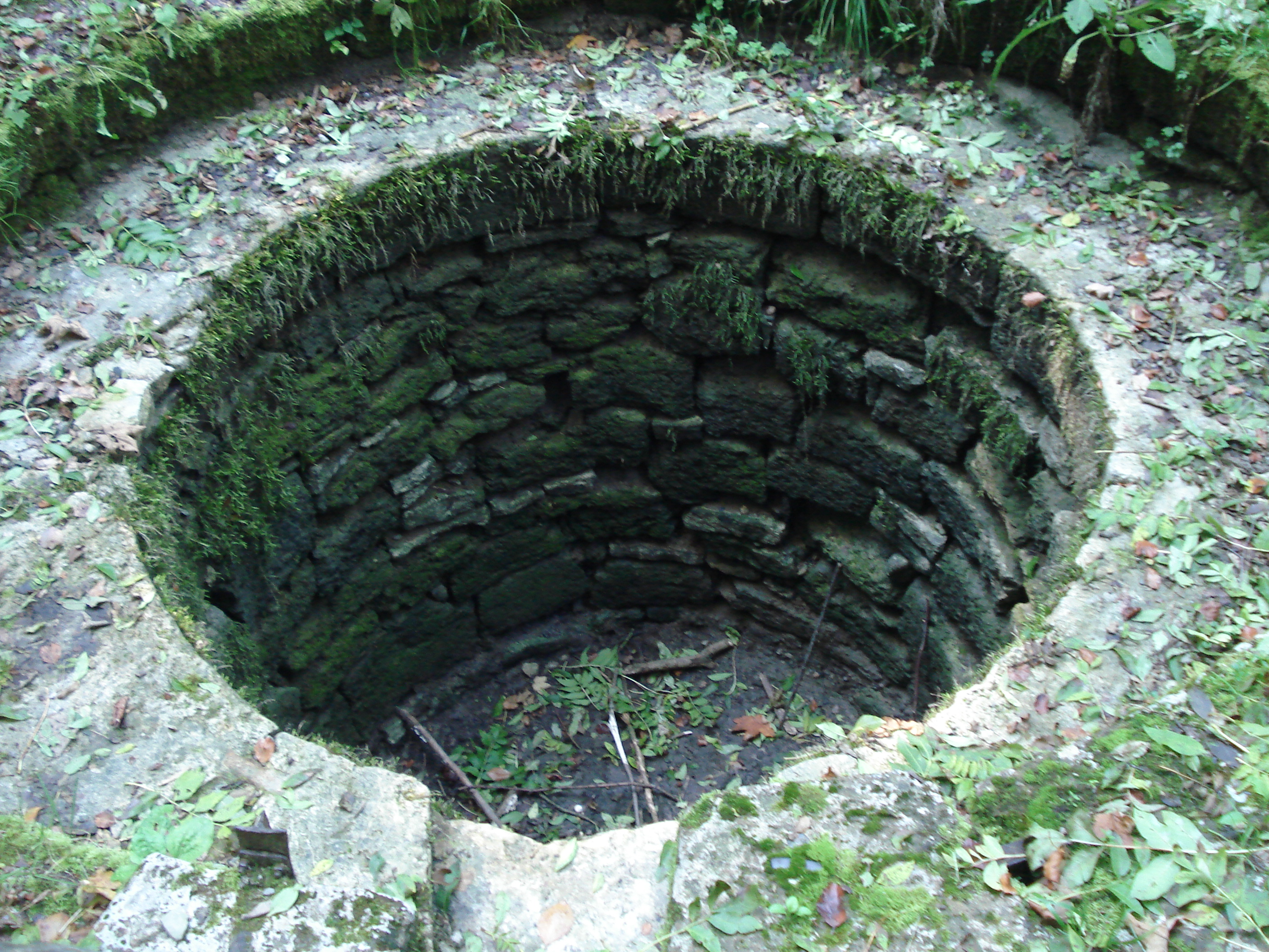 Der Spittelbrunnen ausgetrocknet